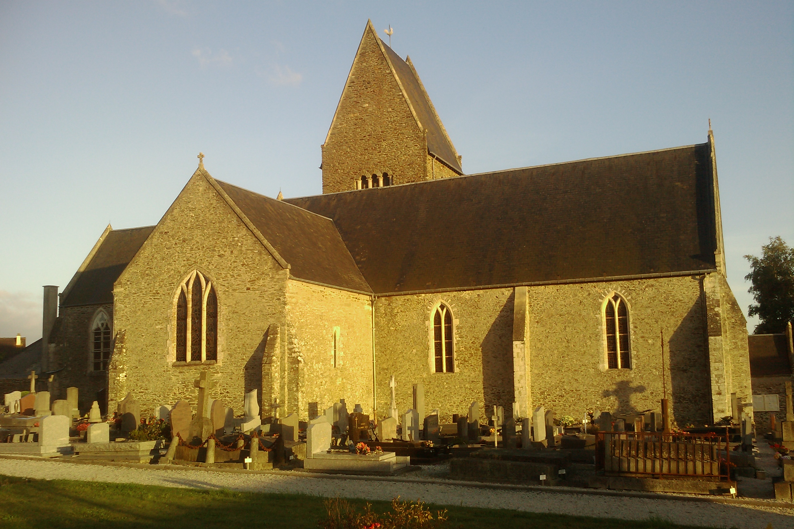 Église de Saint-Georges-Montcocq